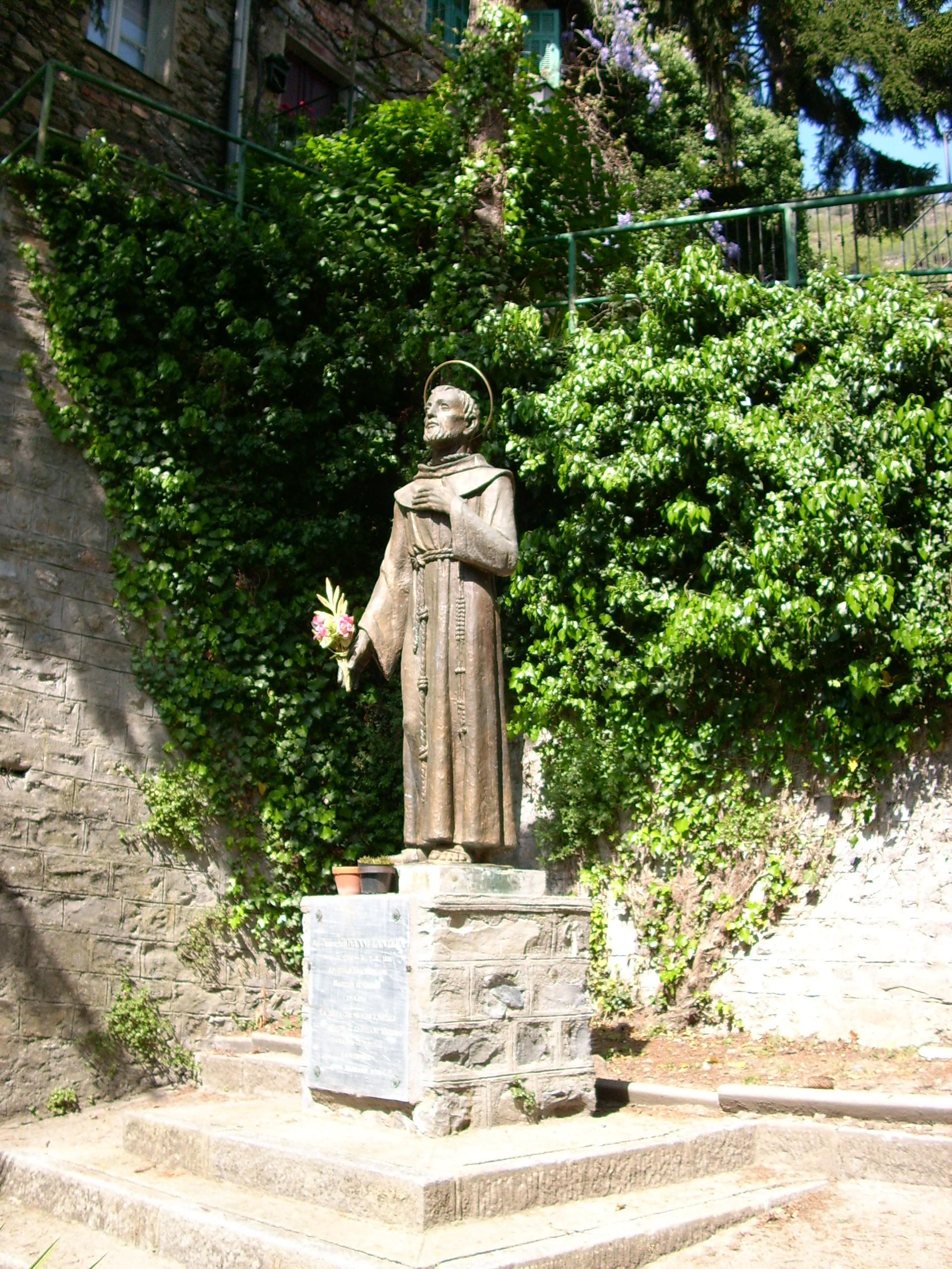 Statua di San Giovanni Lantrua presso Molini di Triora, Liguria, Italia